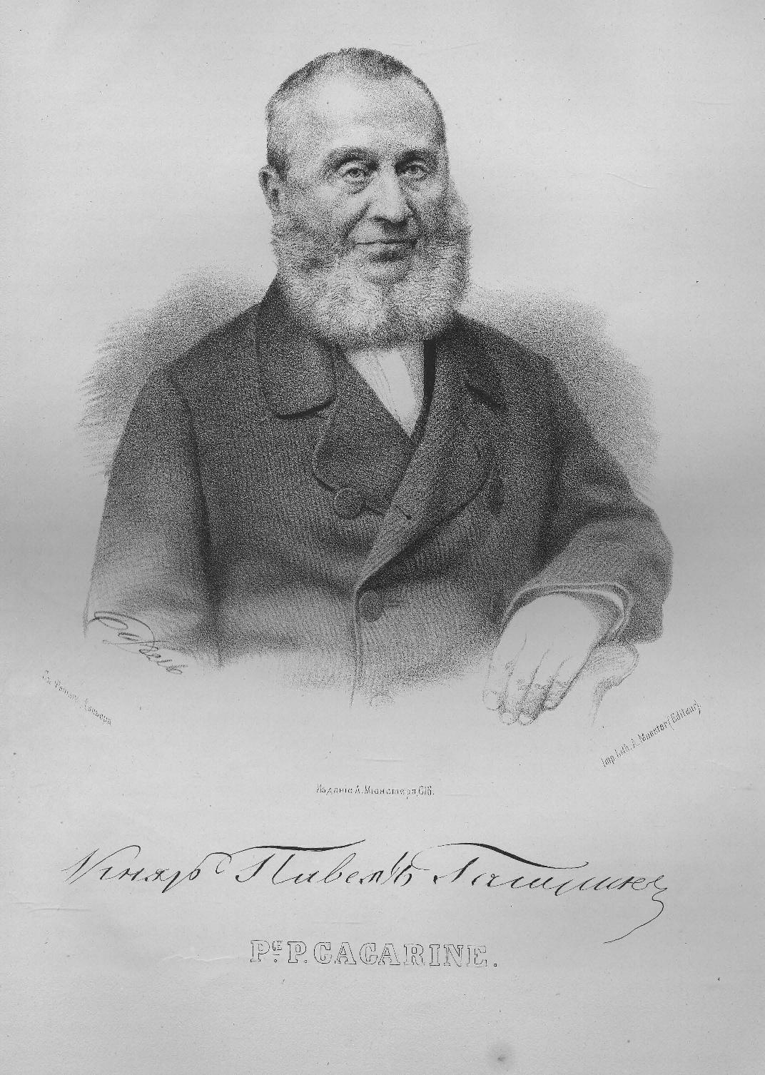 Гагарин, Павел Павлович